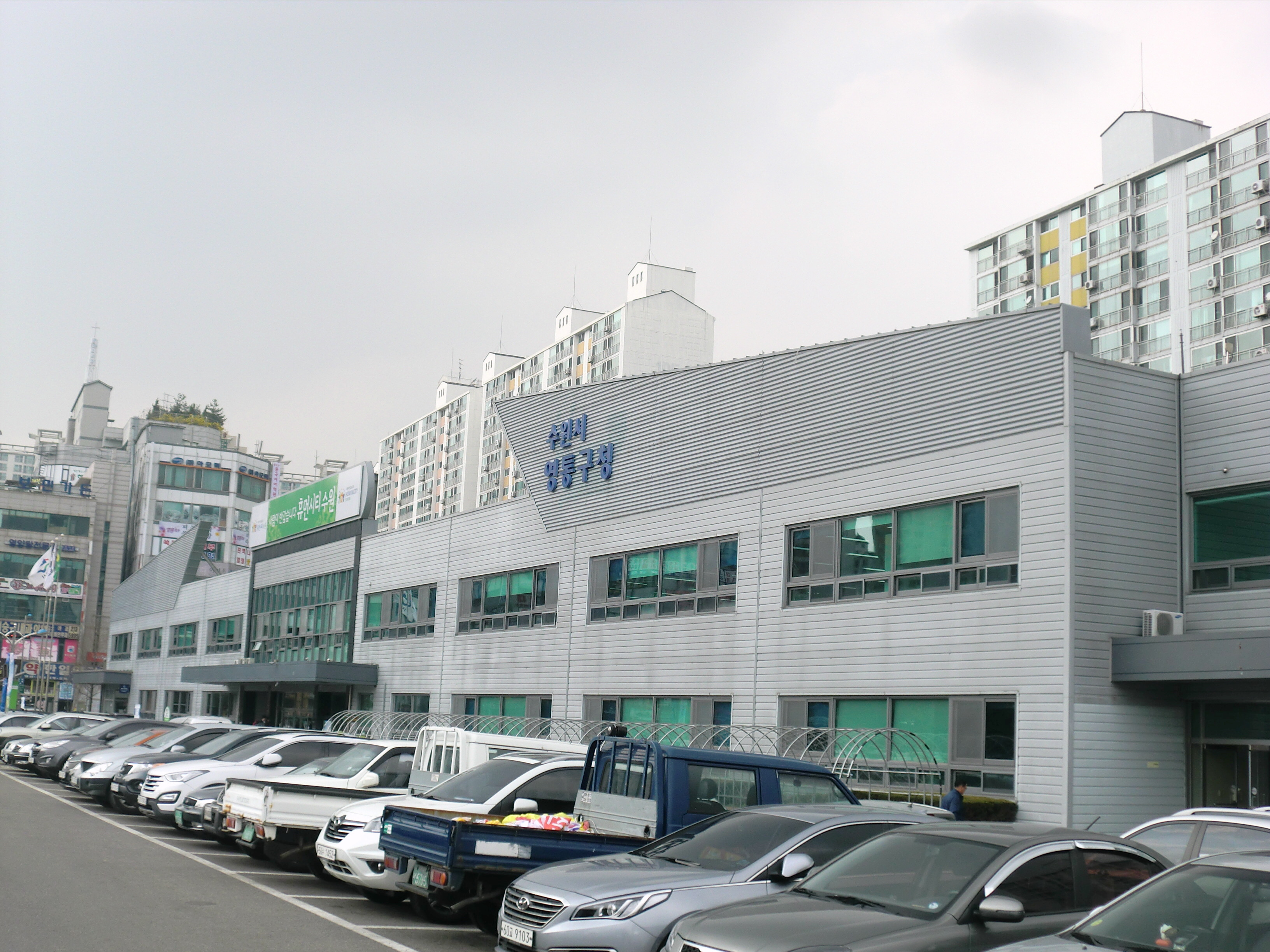 경기도 수원시에 있는 영통구청